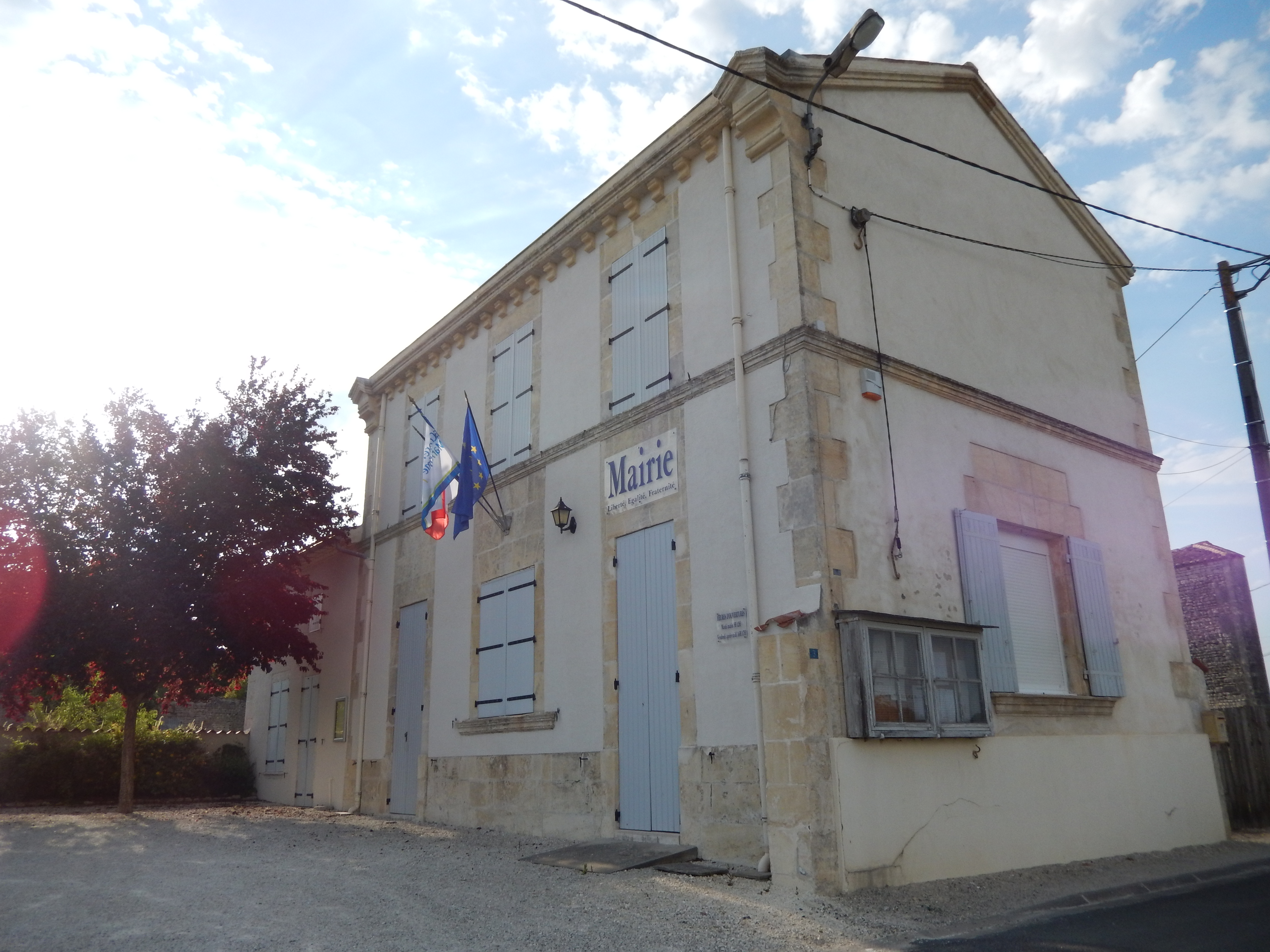 Saint Martin de Juillers, Charente-Maritime, France. • La mairie de la commune.